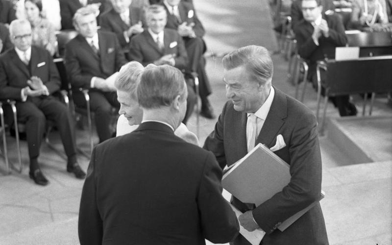 Verleihung des Friedenspreis des Börsenvereins des Deutschen Buchhandels an Gunner und Alva Myrdal (Schweden) in Anwesenheit von Bundespräsident Heinemann in der Frankfurter Paulskirche